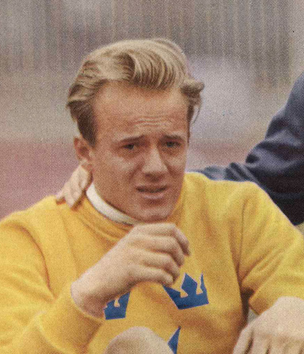 Benke Nilsson (1934- )